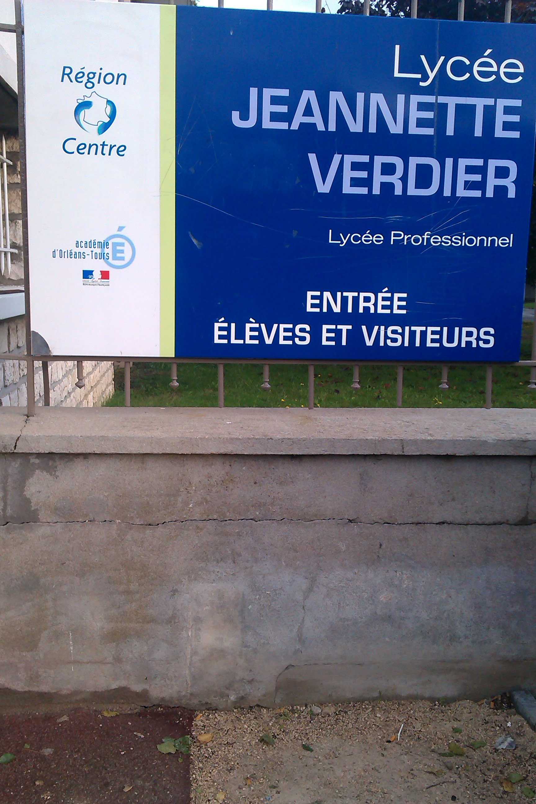 Panneau situé à l'entrée du lycée Jeannette Verdier, Montargis, Loiret, Centre, France